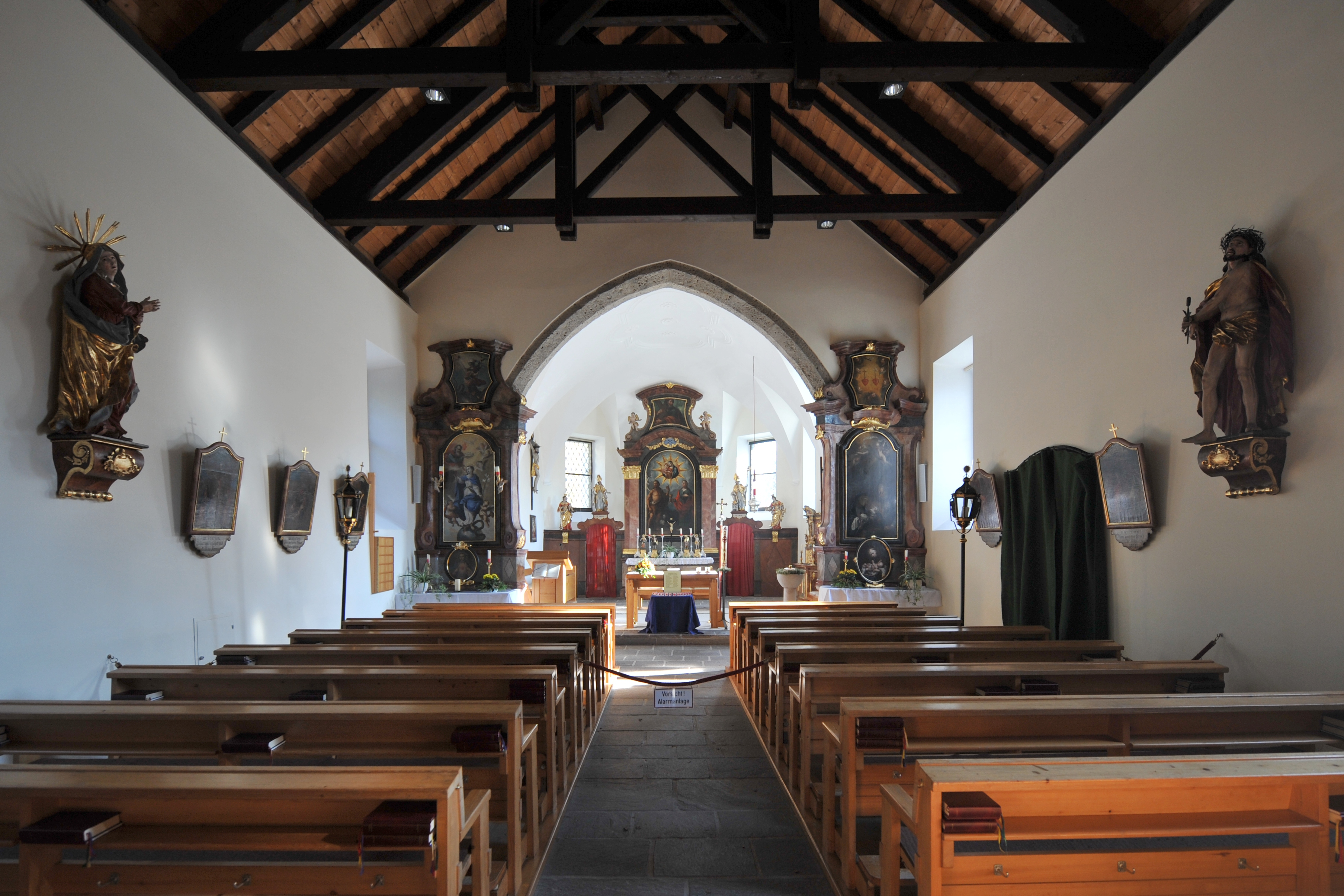 Kath. Pfarrkirche hl. Johannes der Täufer The making of this work was supported by Wikimedia Austria. For other files made with the support of Wikimedia Austria, please see the category Supported by Wikimedia Österreich. Object location47° 43′ 52.9″ N, 13° 03′ 37.62″ E